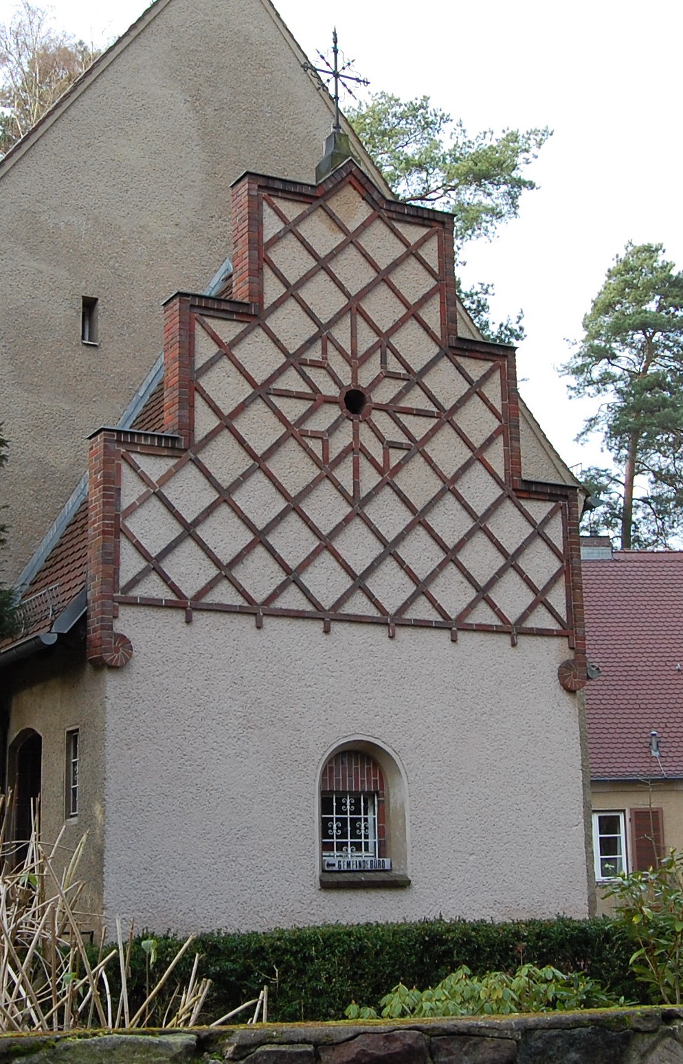 Jesus-Christus-Kirche, Ziergiebel